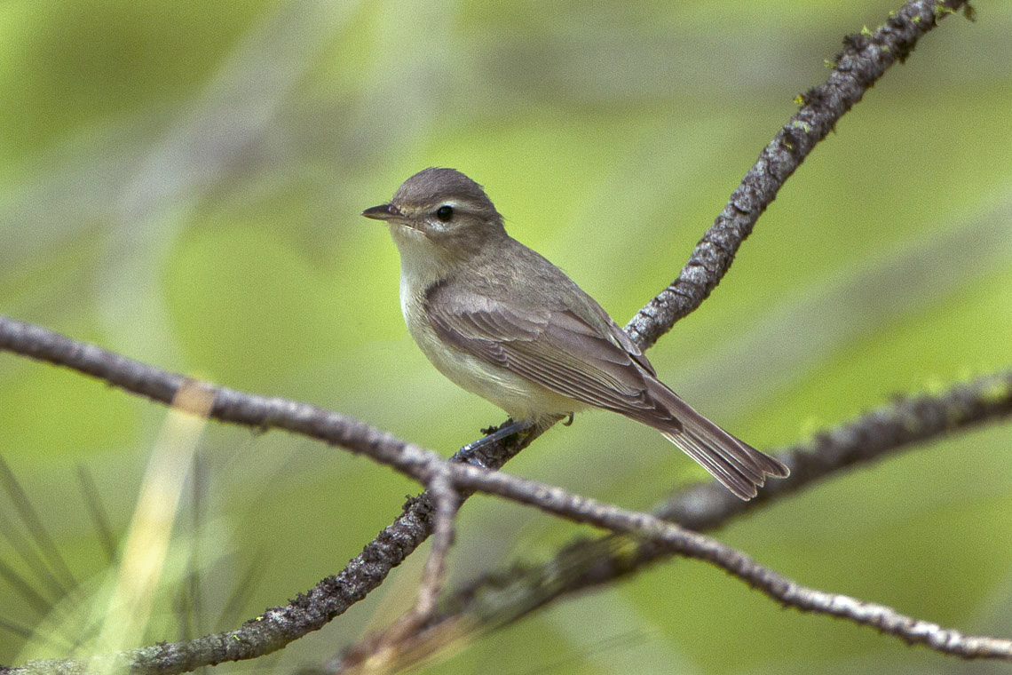 Warbling Vireo - Sisters - Oregon_S4E7012